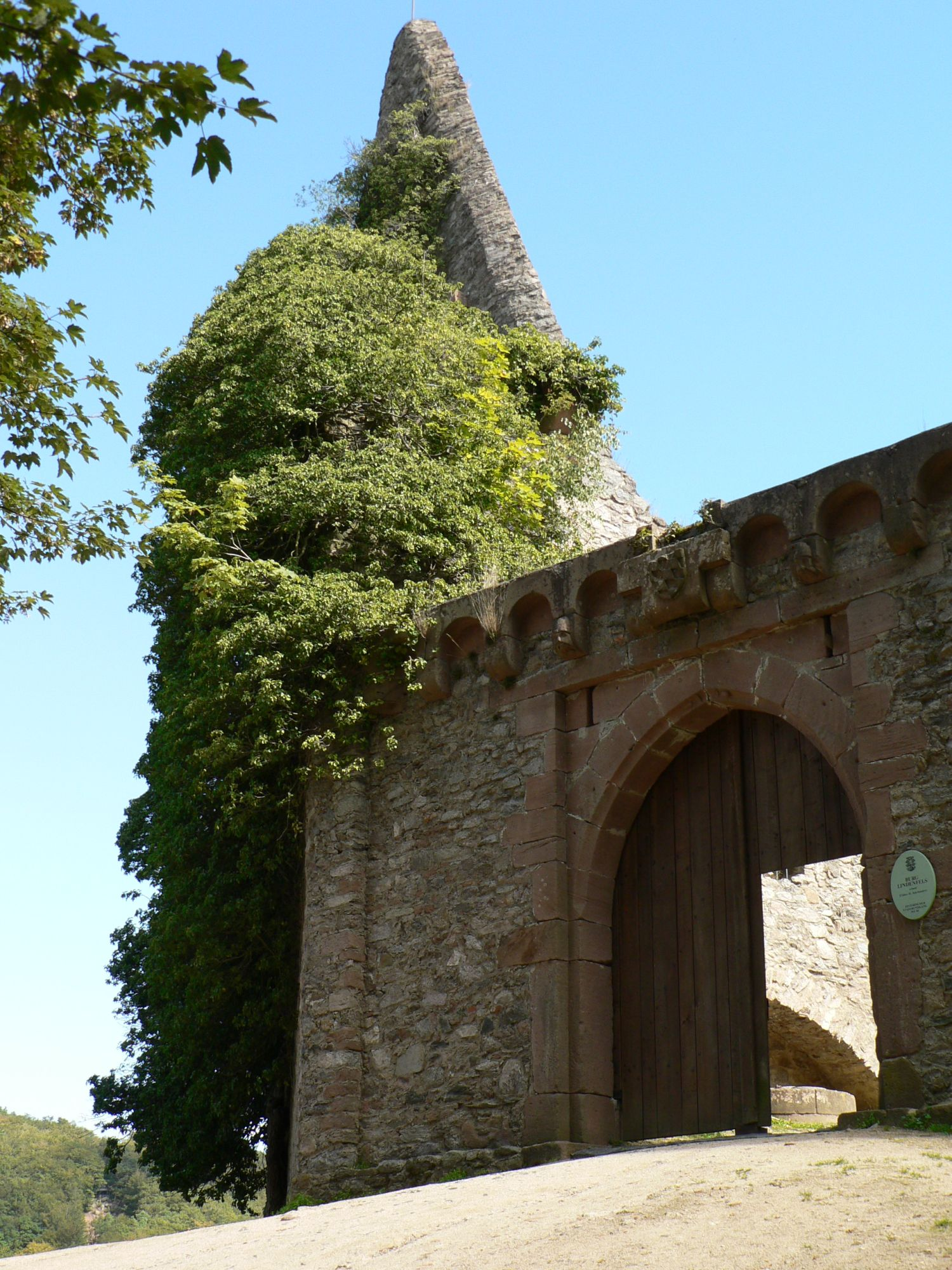 Burgtor von Burg Lindenfels